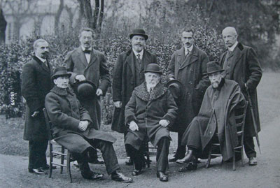 L'administration de l'École normale supérieure de Paris en 1920 : au premier rang de gauche à droite Ernest Vessiot, Gustave Lanson, Paul Dupuy ; debout de droite à gauche Lucien Herr, Fernand Maurette et le « Pot », L. Meynieux. Photographie d'E. Vallois, Bibliothèque de l'École normale supérieure